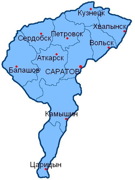 Карта административного деления Саратовской губернии